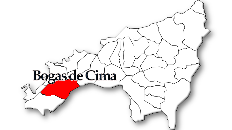 População